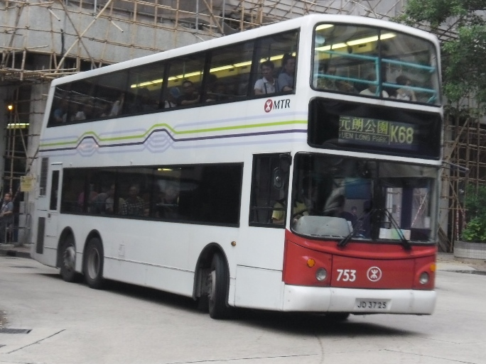 中文（香港）: 港鐵巴士K68線，正駛離朗屏巴士總站，元朗公園